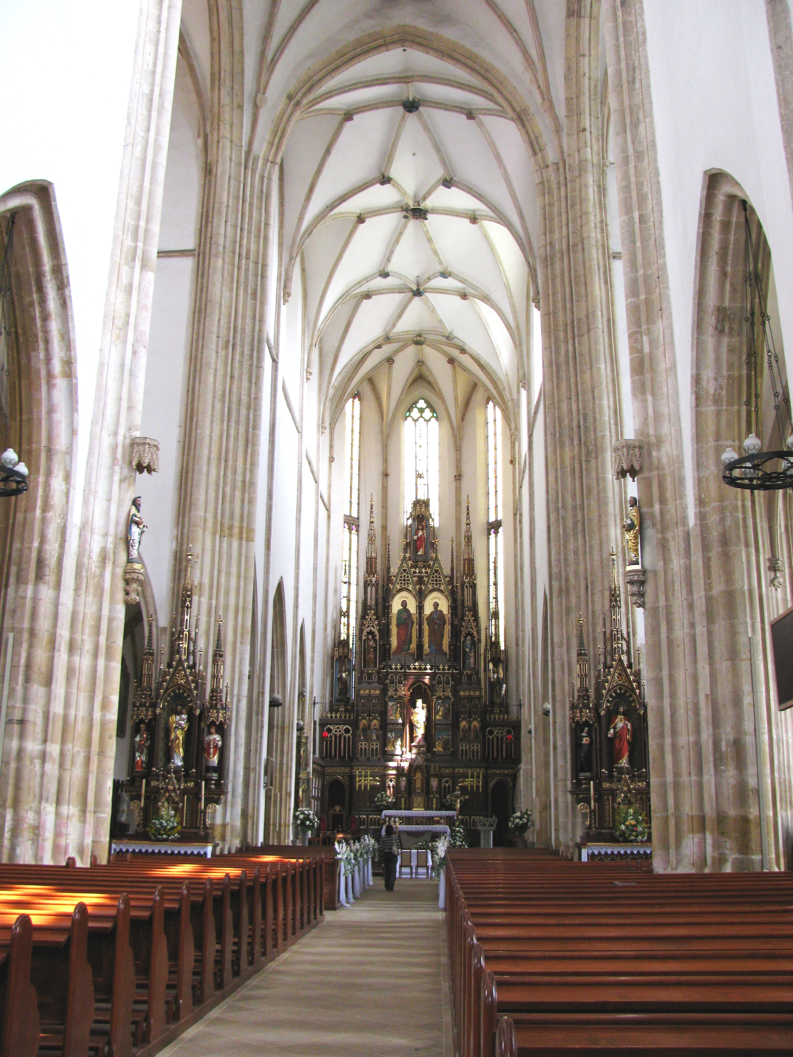 Strzegom, pl. Jana Pawła II - dawny kościół Joannitów, obecnie kościół parafialny p.w. św. Piotra i Pawła Widok z nawy głównej na ołtarz (zabytek nr A/1685/73)